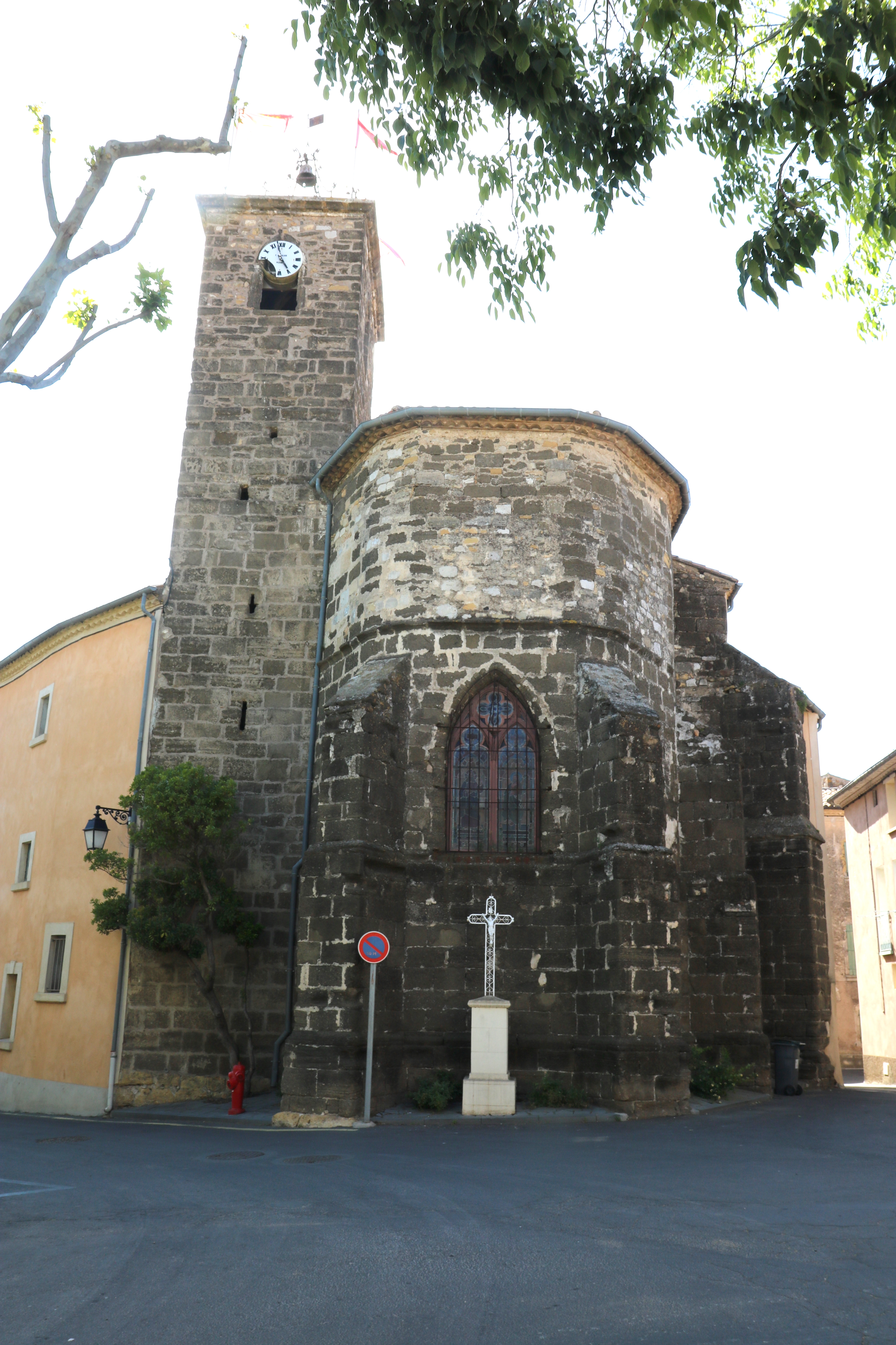 Adissan (Hérault) - chevet et clocher de l'église Saint-Adrien